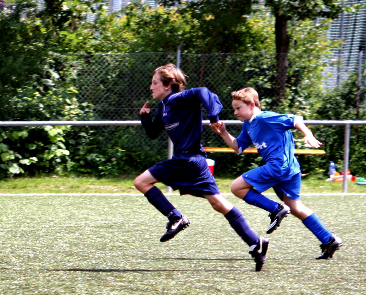 Sprint in einem Fußballspiel. München Jugendmannschaften. FC Wacker gegen DJK Pasing.